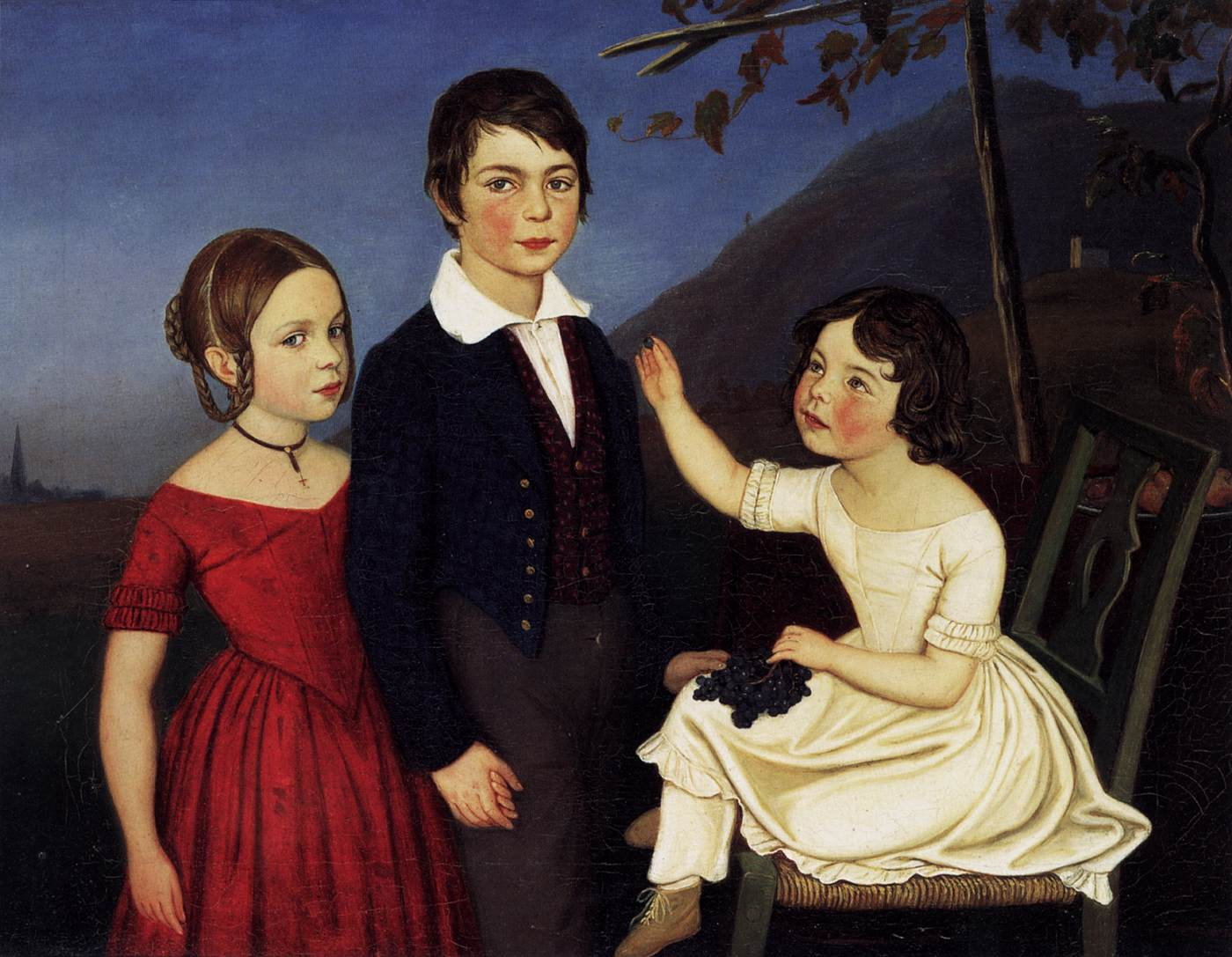 children of Johann Putzer von Reibegg